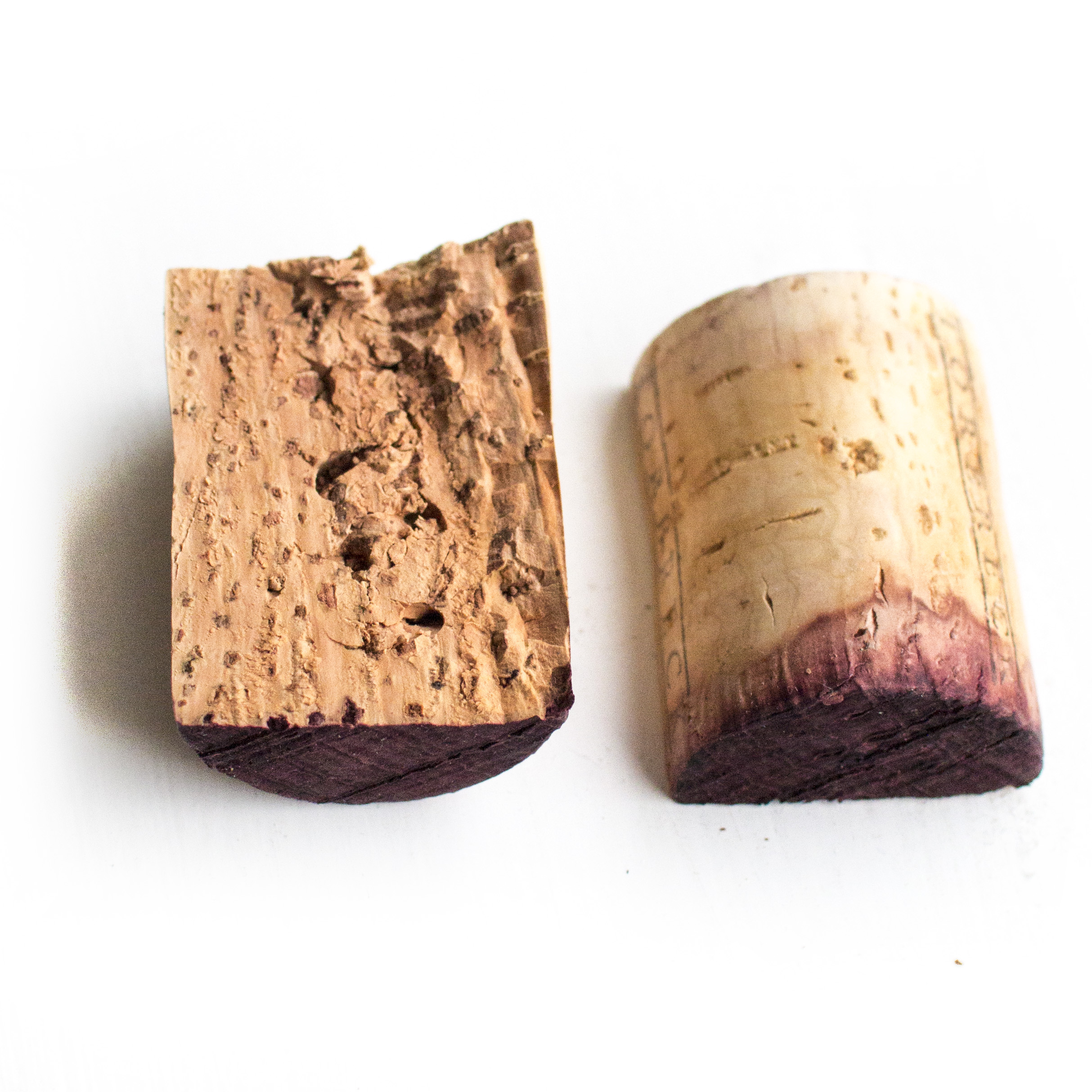 Pénétration du vin dans le bouchon